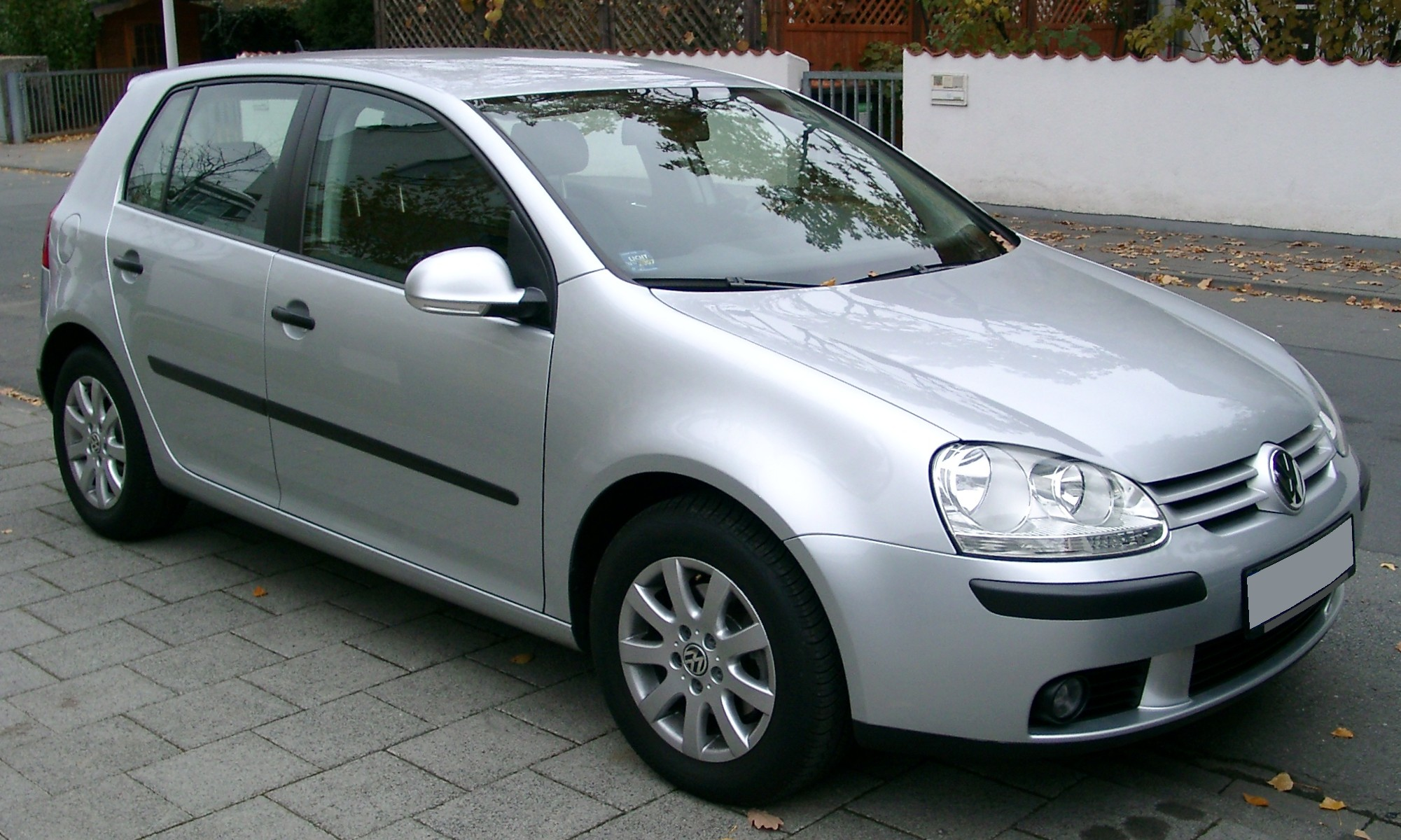 VW Golf V